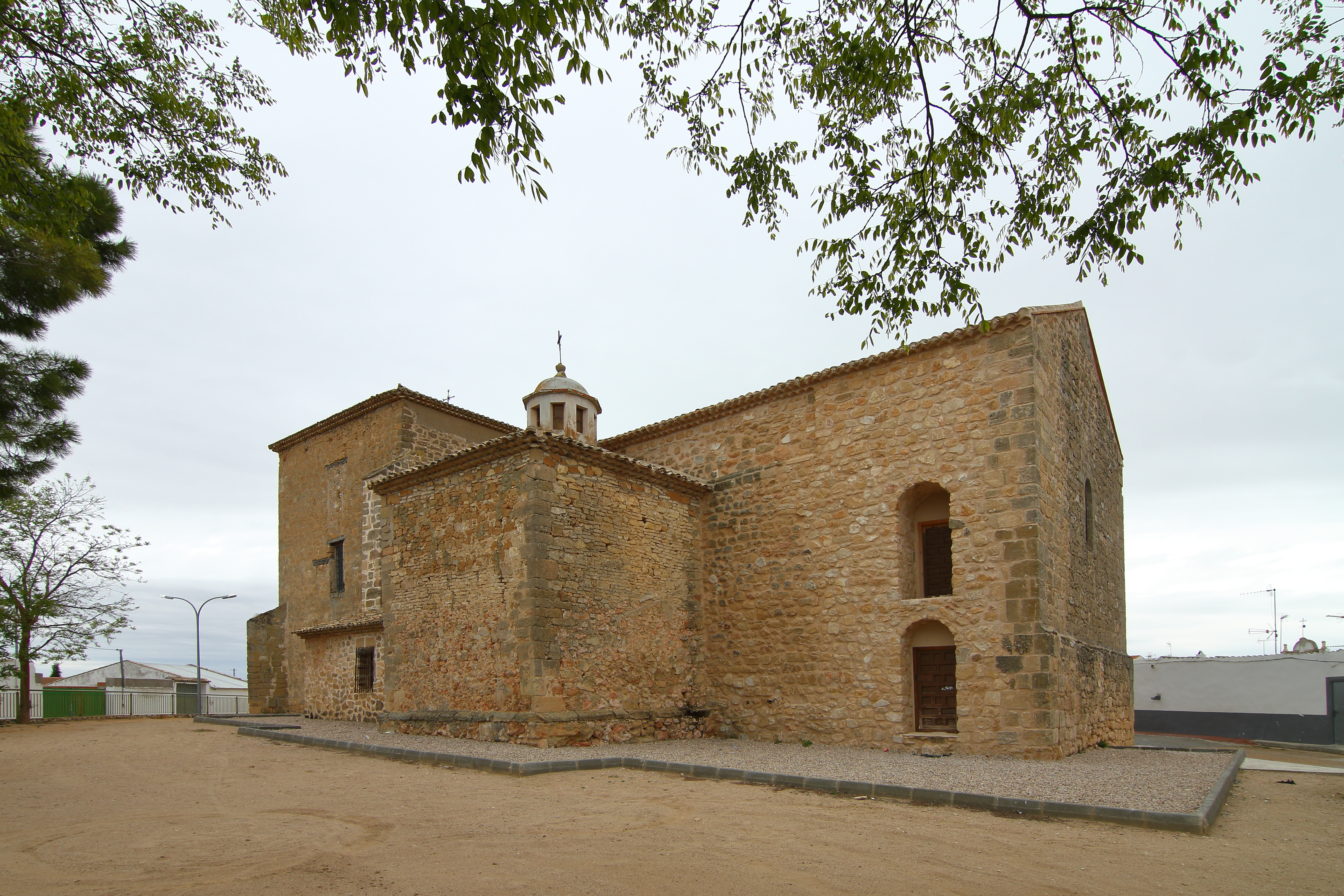 Cervera del Llano, iglesia de San Pedro Apóstol, 02